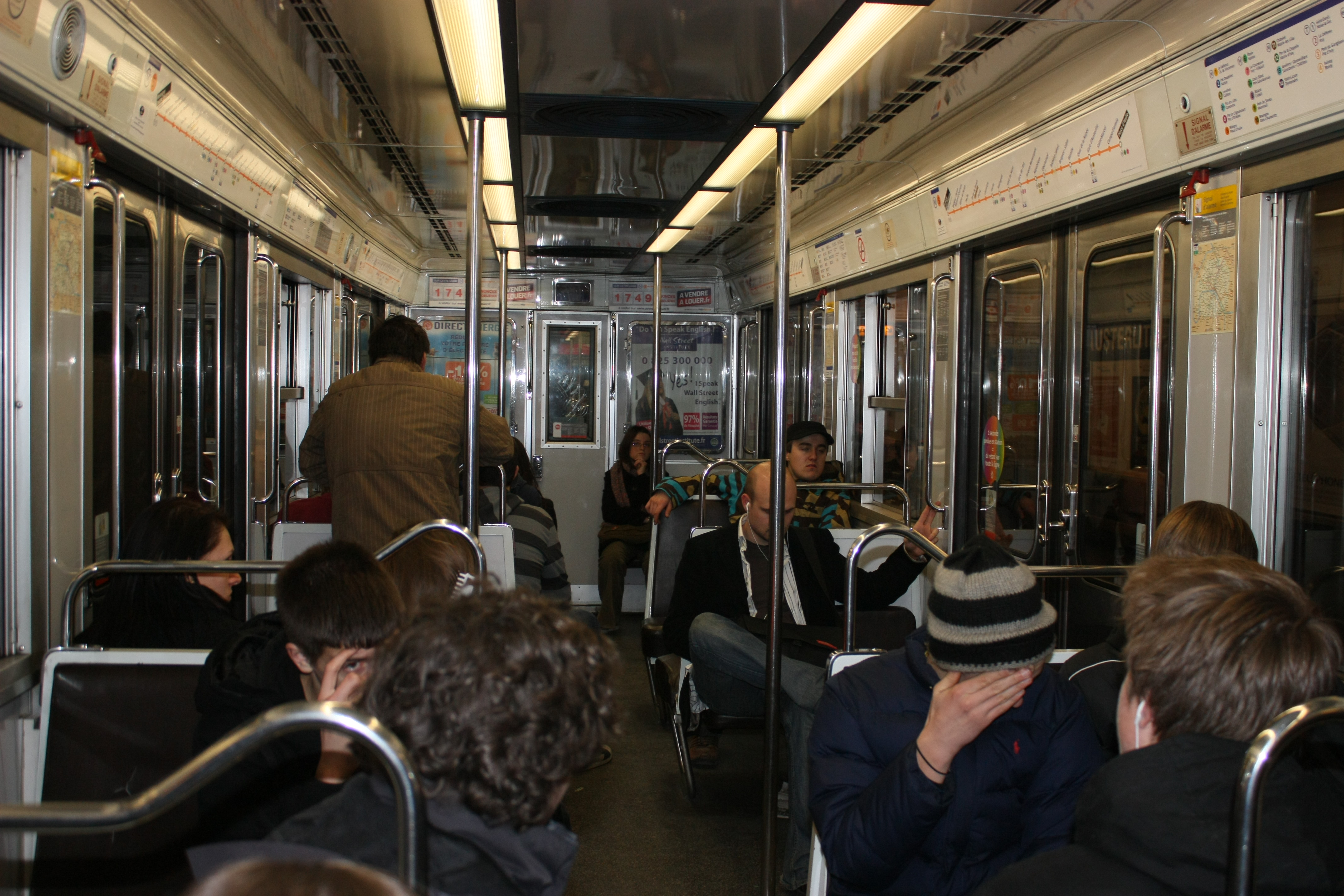 Innenraum der Métro Paris, einer Pariser U-Bahn.